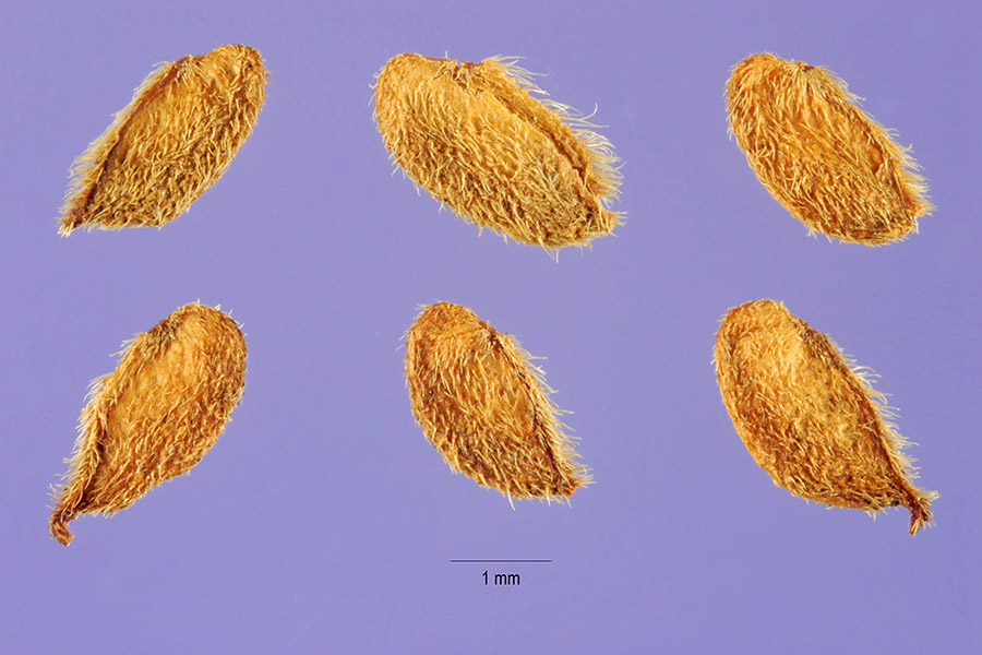 Filipendula vulgaris Moench - dropwort